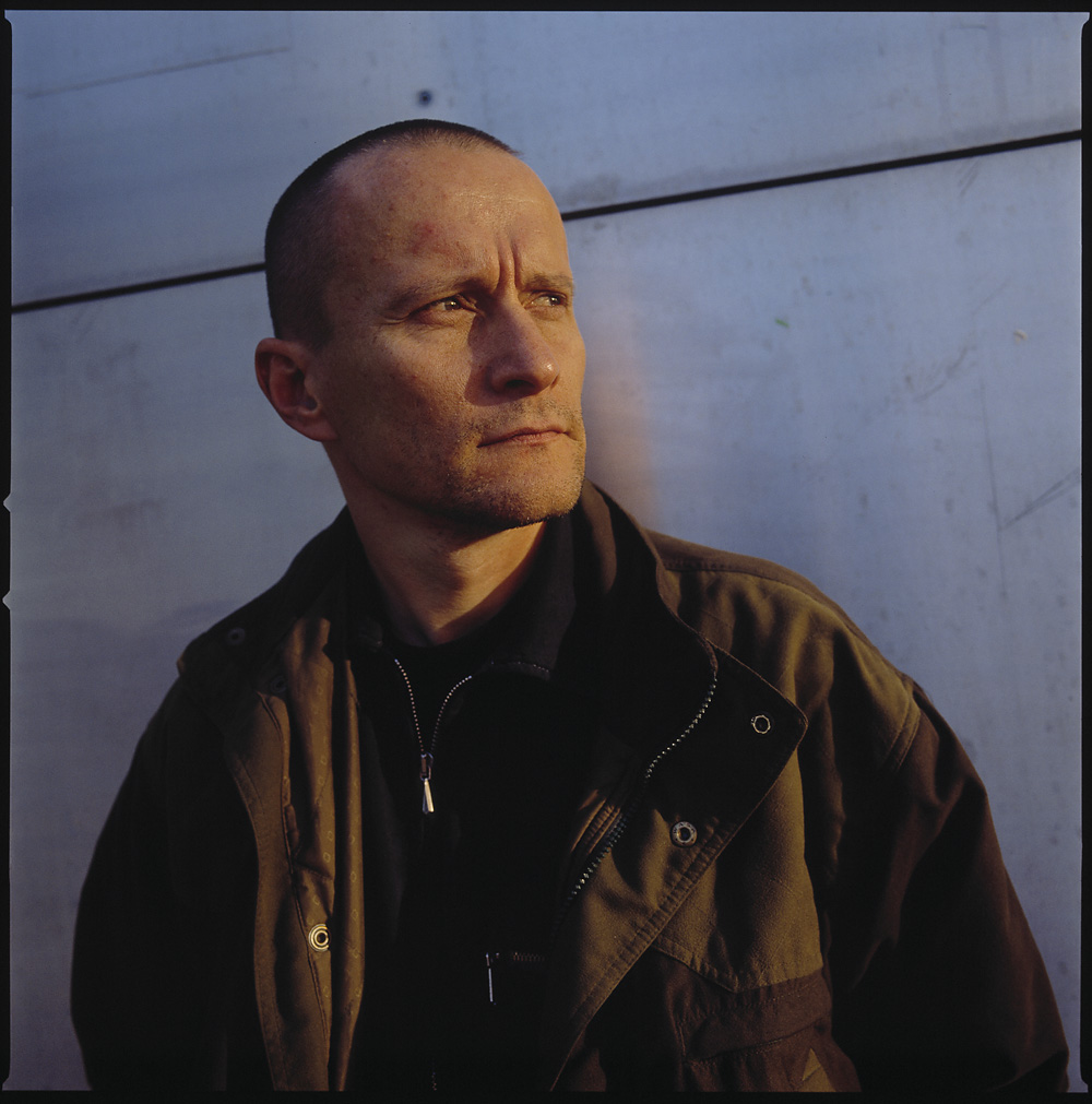 taiteilija Esko MÄNNIKKÖ (Suomi, Finland), taiteilija, henkilökuva ARS 01, Kiasma 30.9.01-20.1.02 kuva: Pirje Mykkänen/ Kuvataiteen keskusarkisto